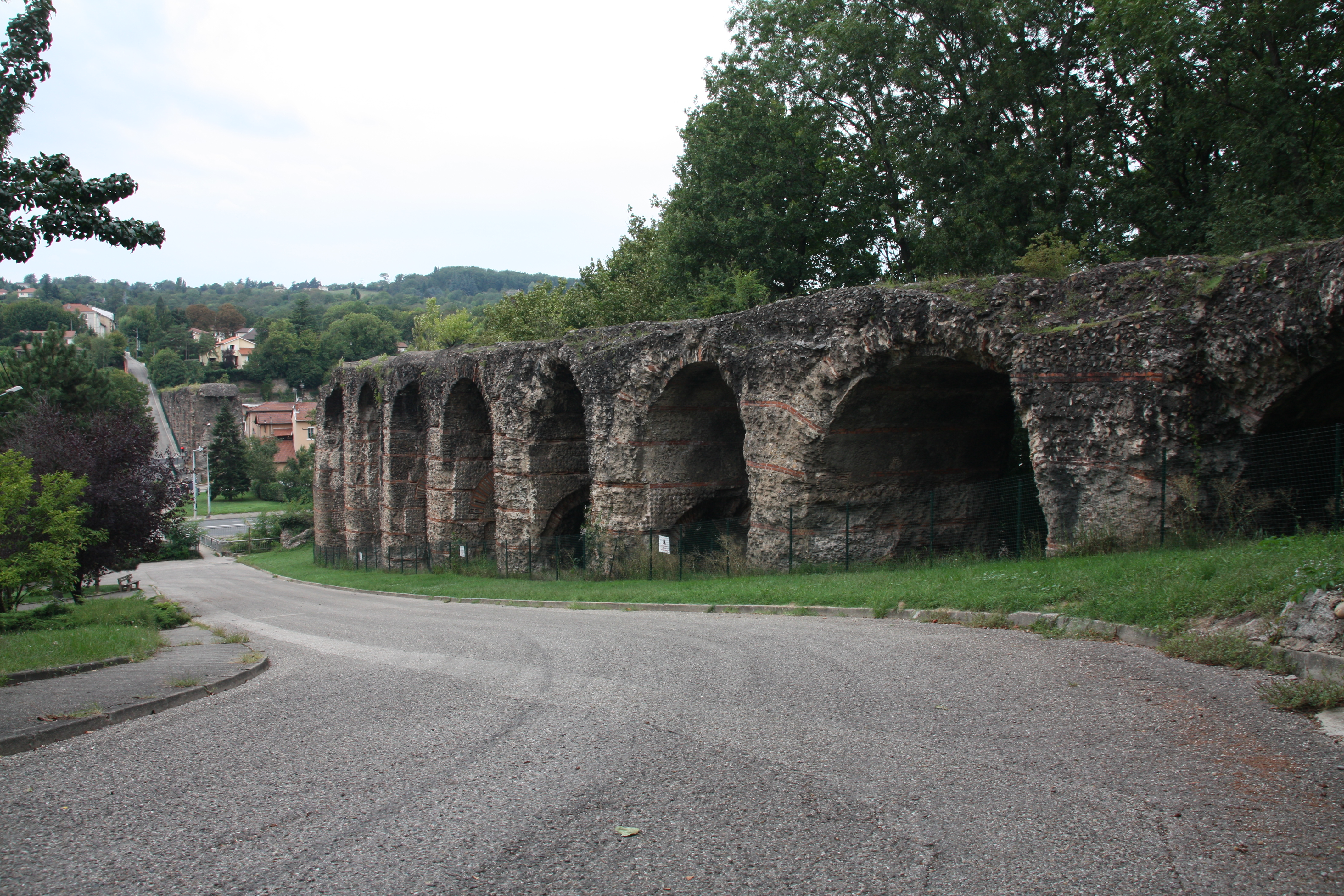 This building is en partie classé, en partie inscrit au titre des Monuments Historiques. .